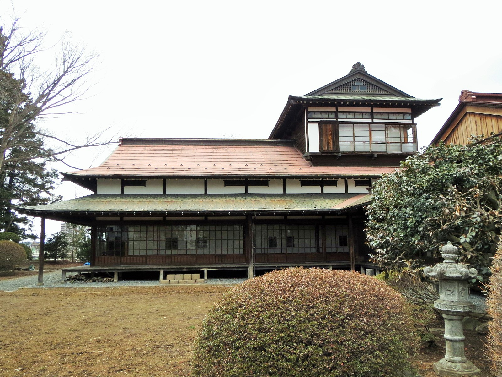 八戸市にある更上閣 Canon IXY 3